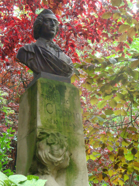 FREDERIC CHOPIN, jardin du Luxembourg